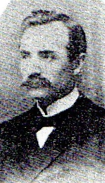 ディサイプルス宣教師ハーヴィー・ヒューゴー・ガイ